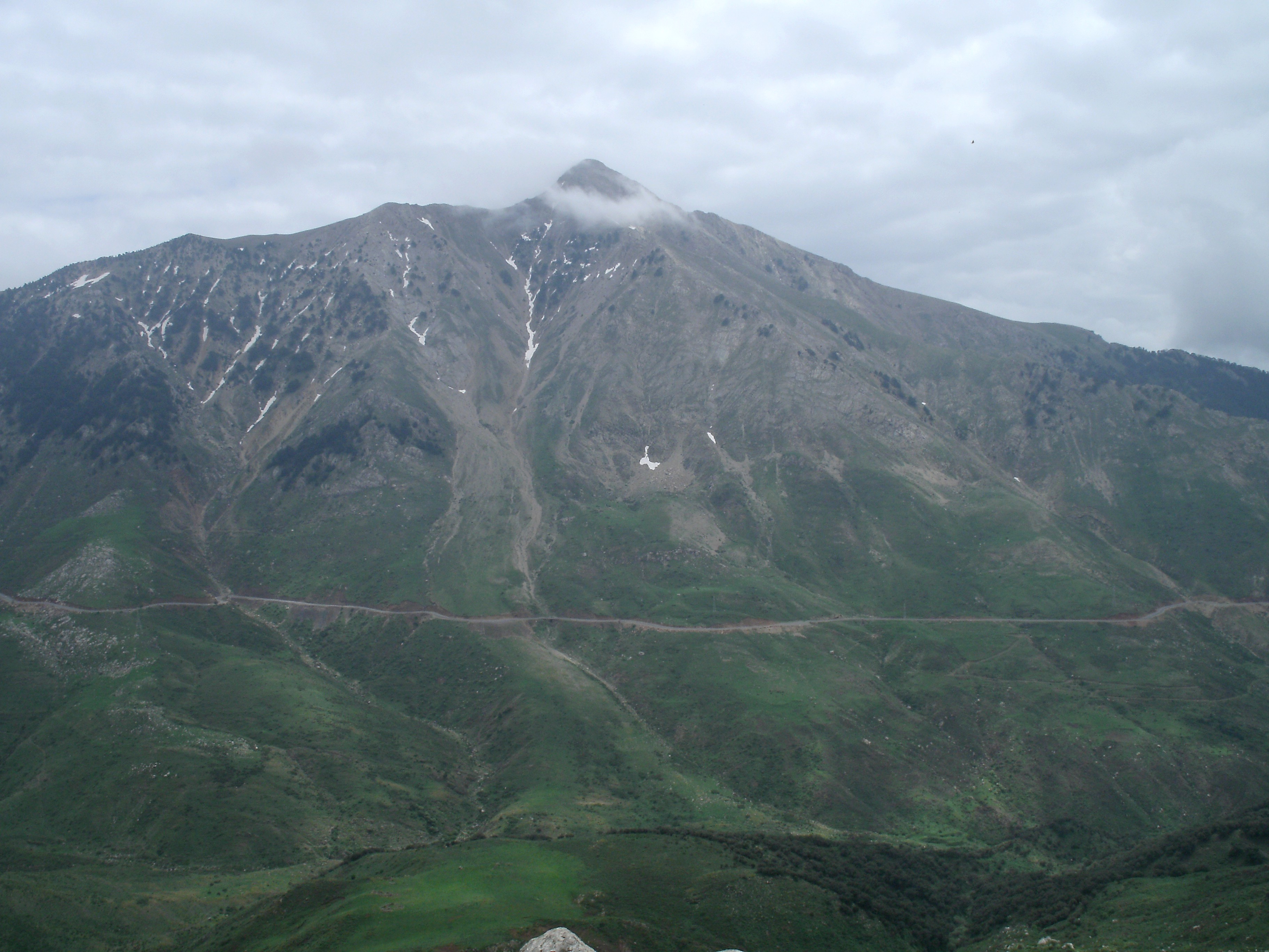 Le mont Lalla Khadidja, 2308 m, sommet de l'atlas algérien, dans le Djurdjura